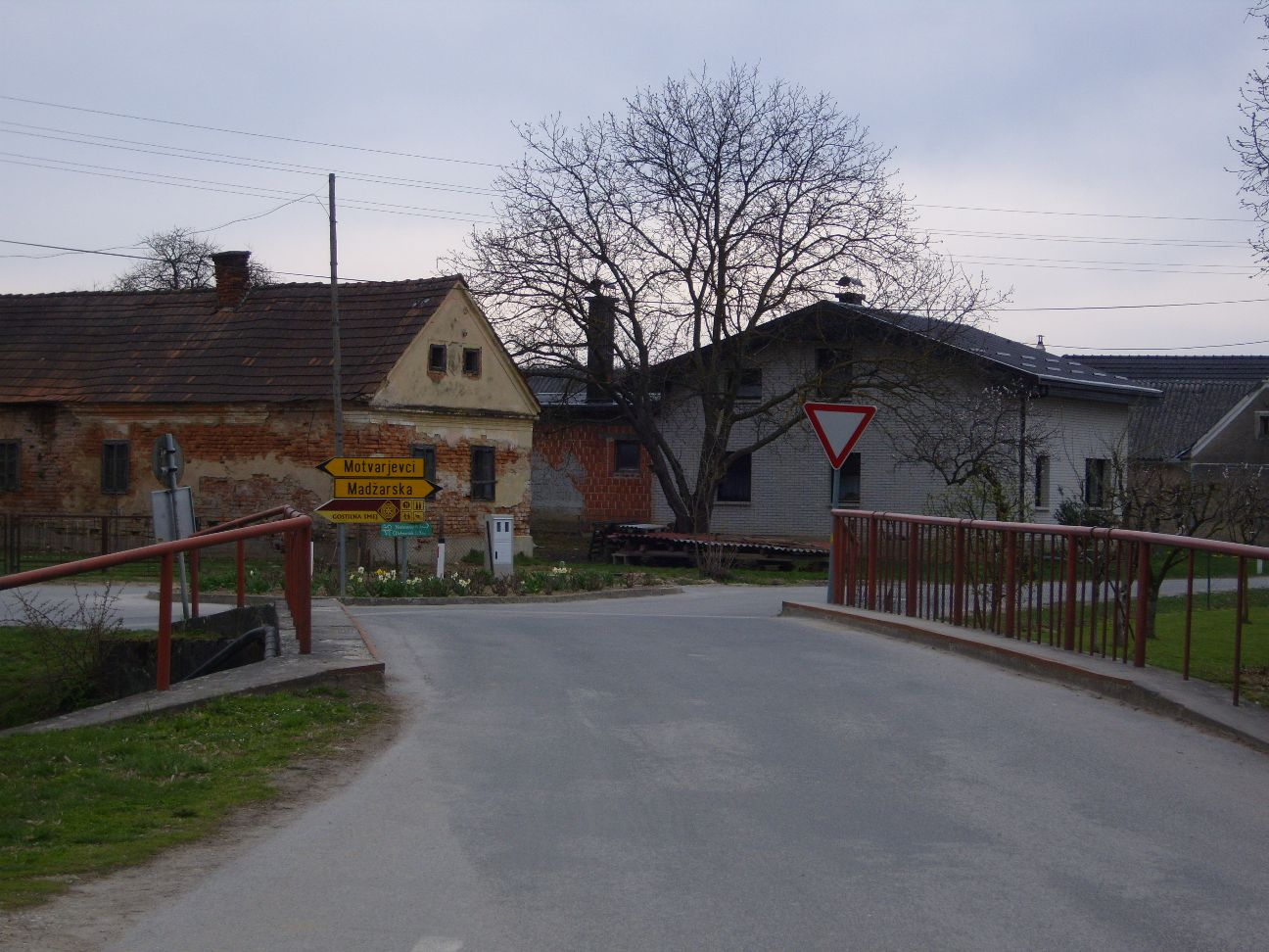 Hier geht's nach Ungarn